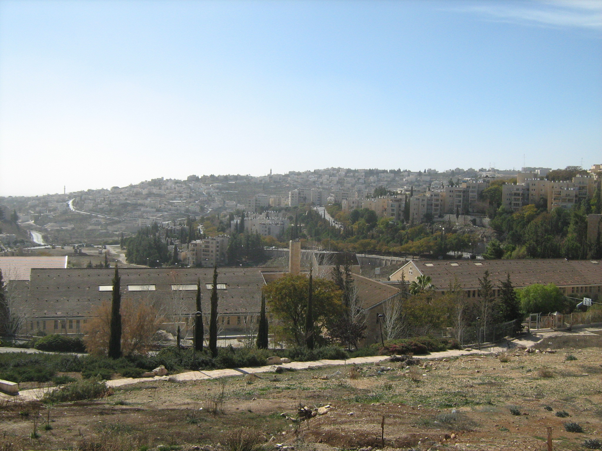 תלפיות מזרח מכיוון גם אמת המים